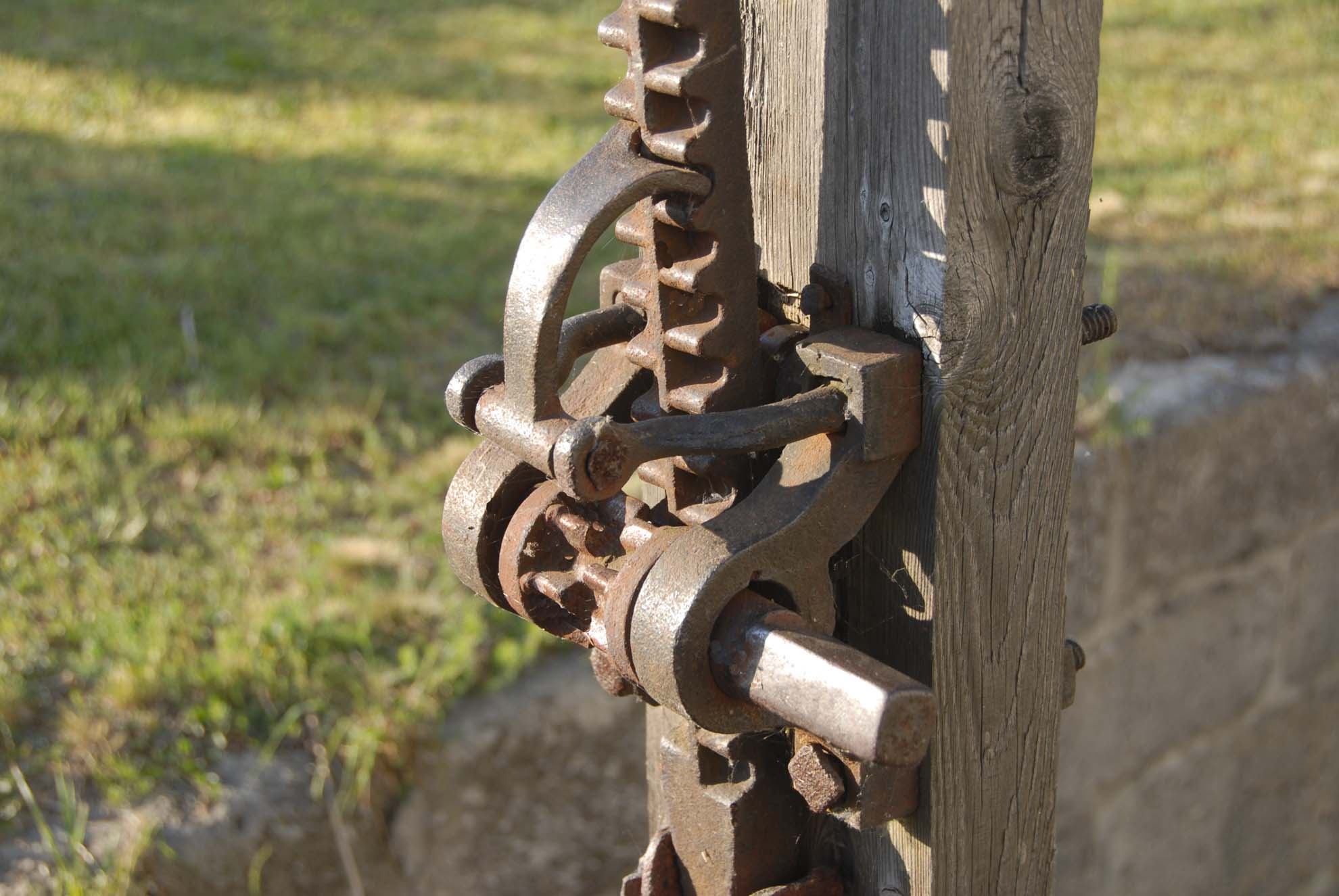 sluice detail